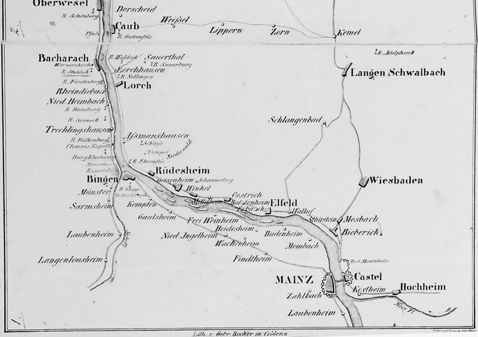 Der Rhein von Mainz